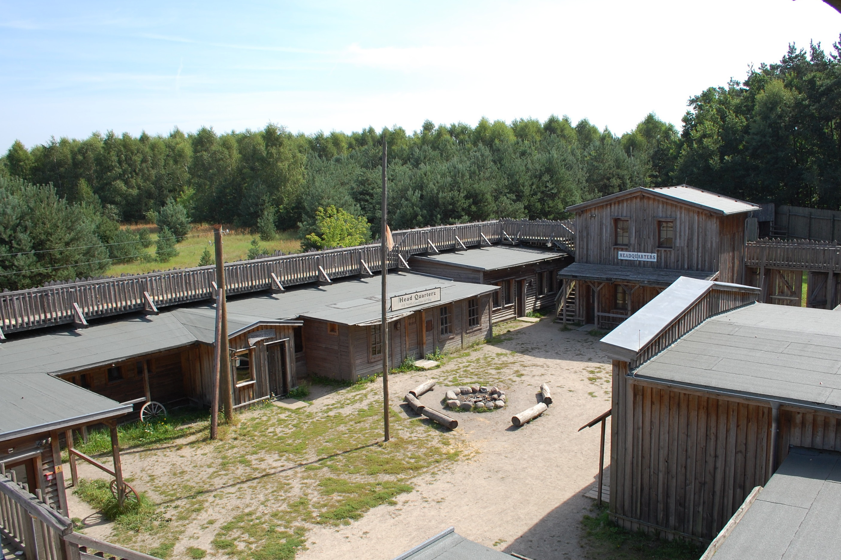 Templin Eldorado Fort